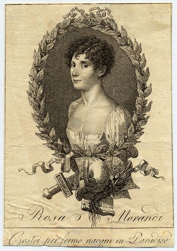 Acquaforte di incisore anonimo, prima metà Ottocento